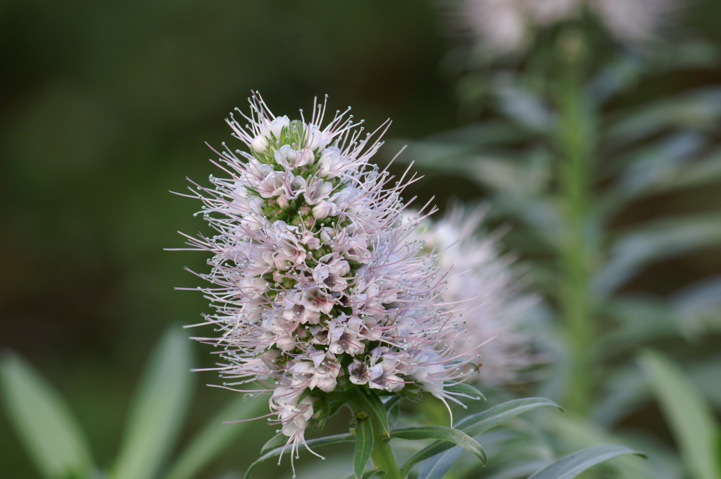 Blütenstand des Hierro-Natternkopfs (Echium hierrense) (Berlin, Botanischer Garten, 27.01.2006)